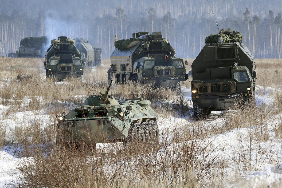 Полевой выход 29-й гвардейской ракетной Витебской дивизии.